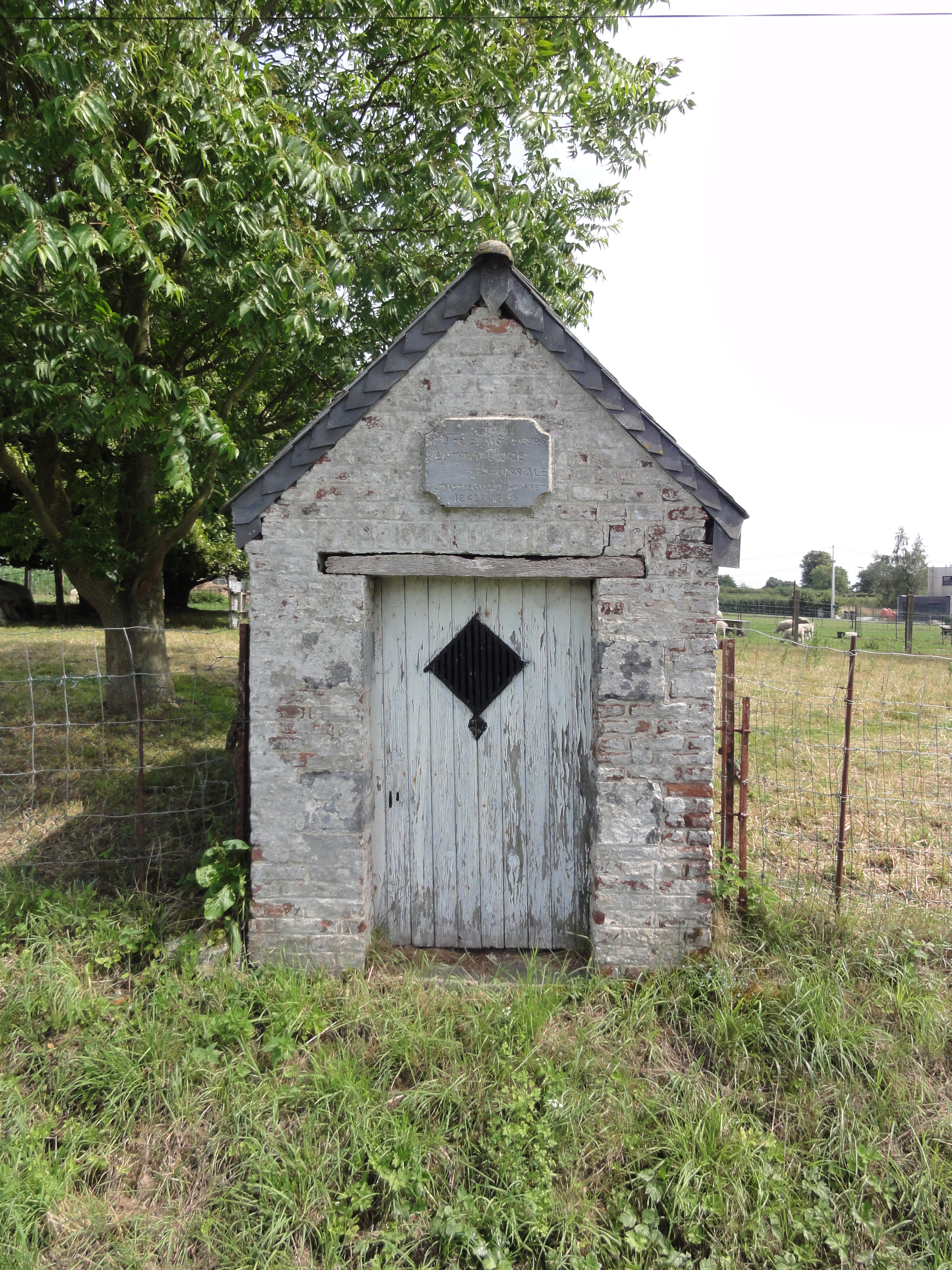 Bermeries (Nord, Fr) chapelle N.D. de Bon secours